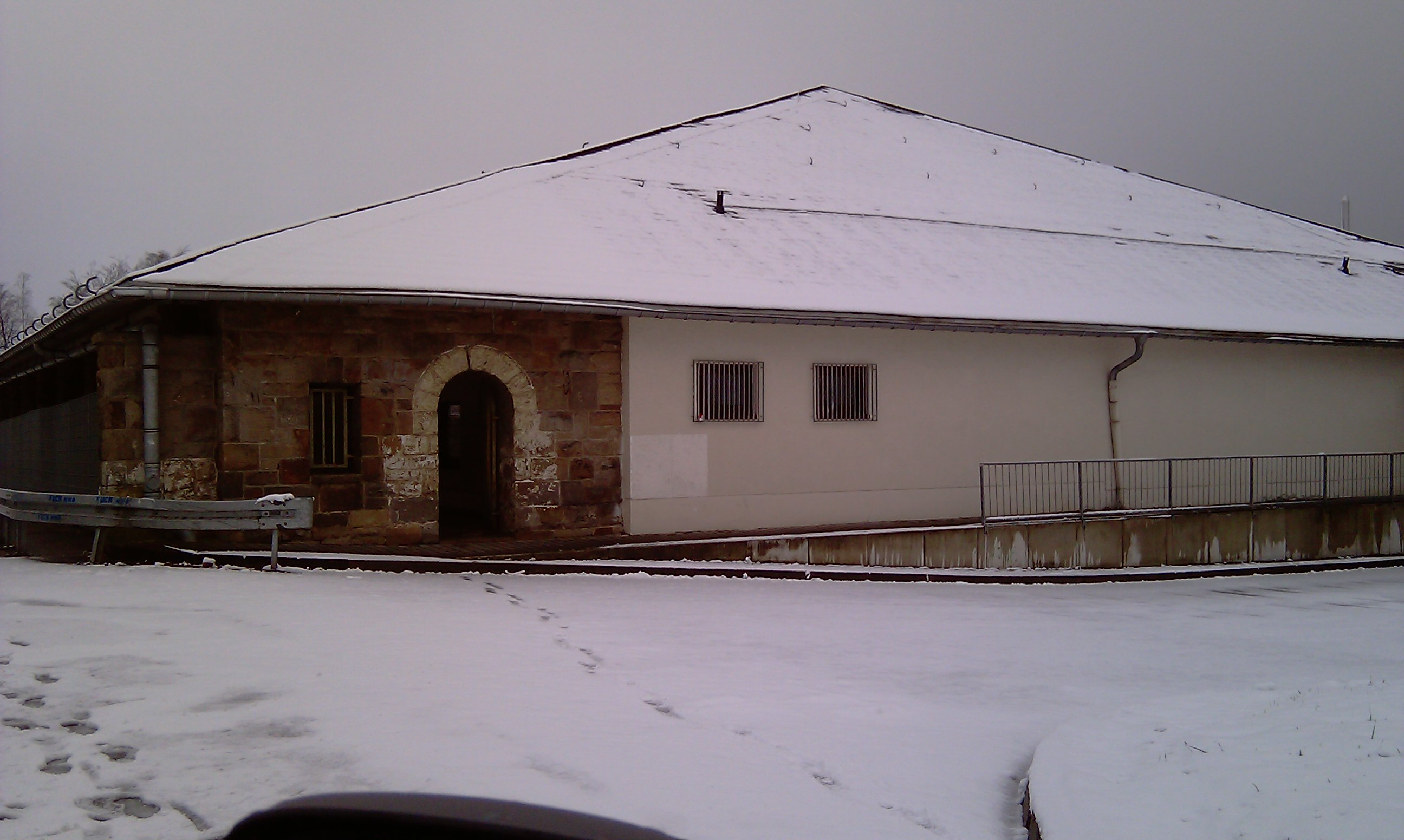 Ehemalige Turnhalle der Flakkaserne Buckesfeld, nun ALDI